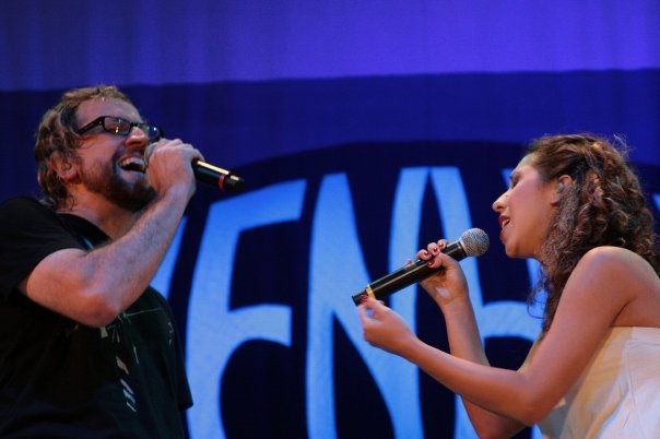 Ivonne Guzmán cantando con Thedy Correa